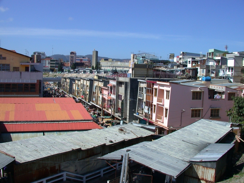 Vietnam roof: Dalat, Vietnam